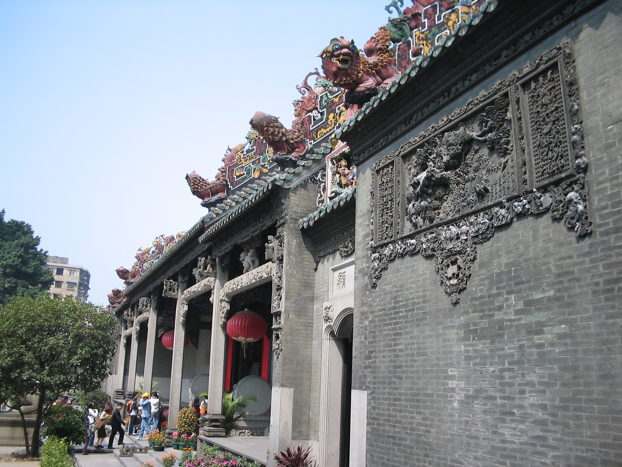 自己拍的